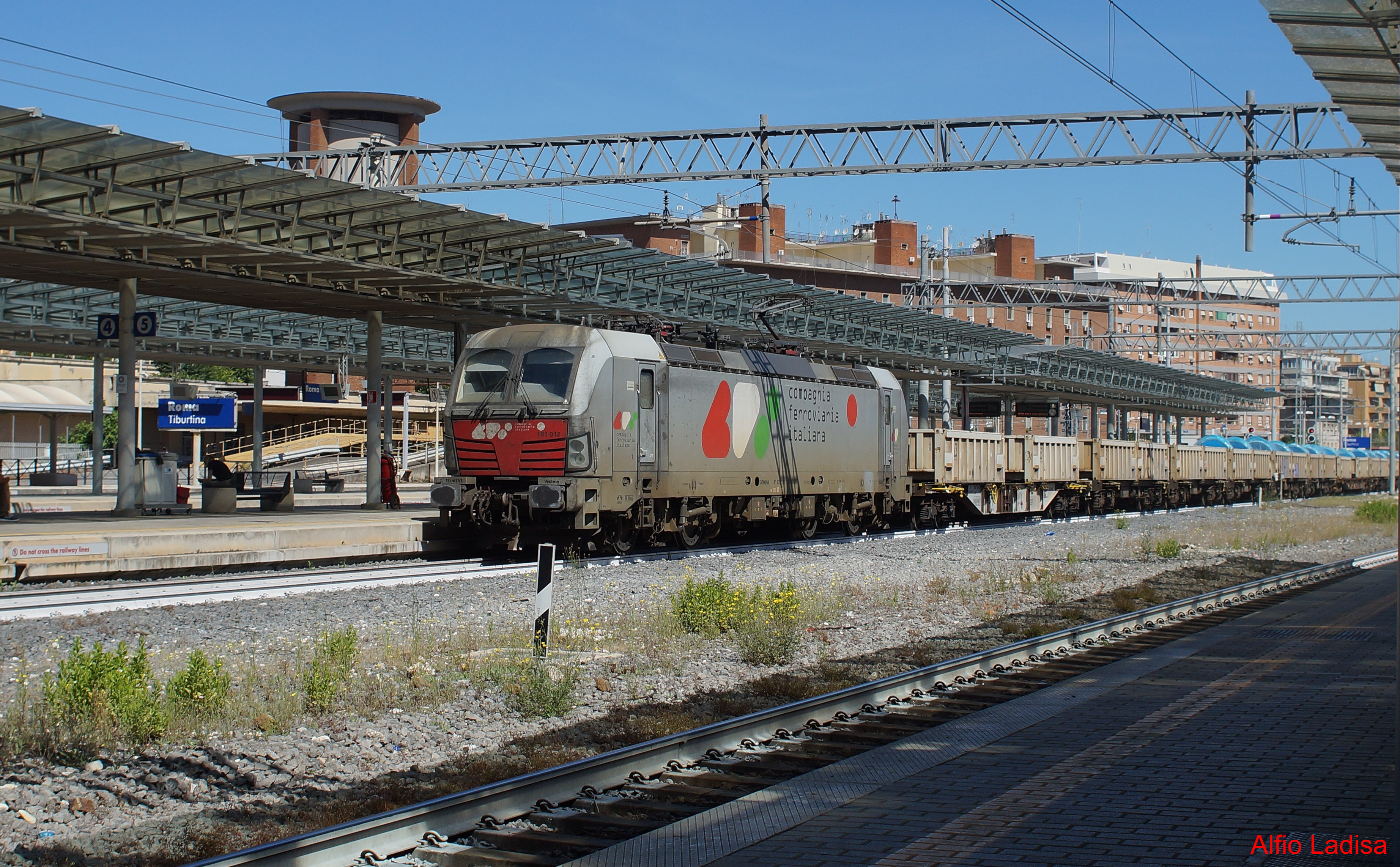 La 191.012 Vectron della Compagnia Ferroviaria Italiana traina un treno merci in transito nella stazione di Roma Tiburtina